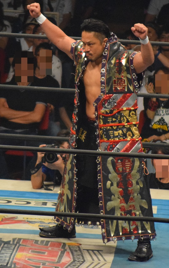 2015年7月5日 大阪城ホール 「DOMINION 7.5 in OSAKA-JO HALL」 後藤洋央紀